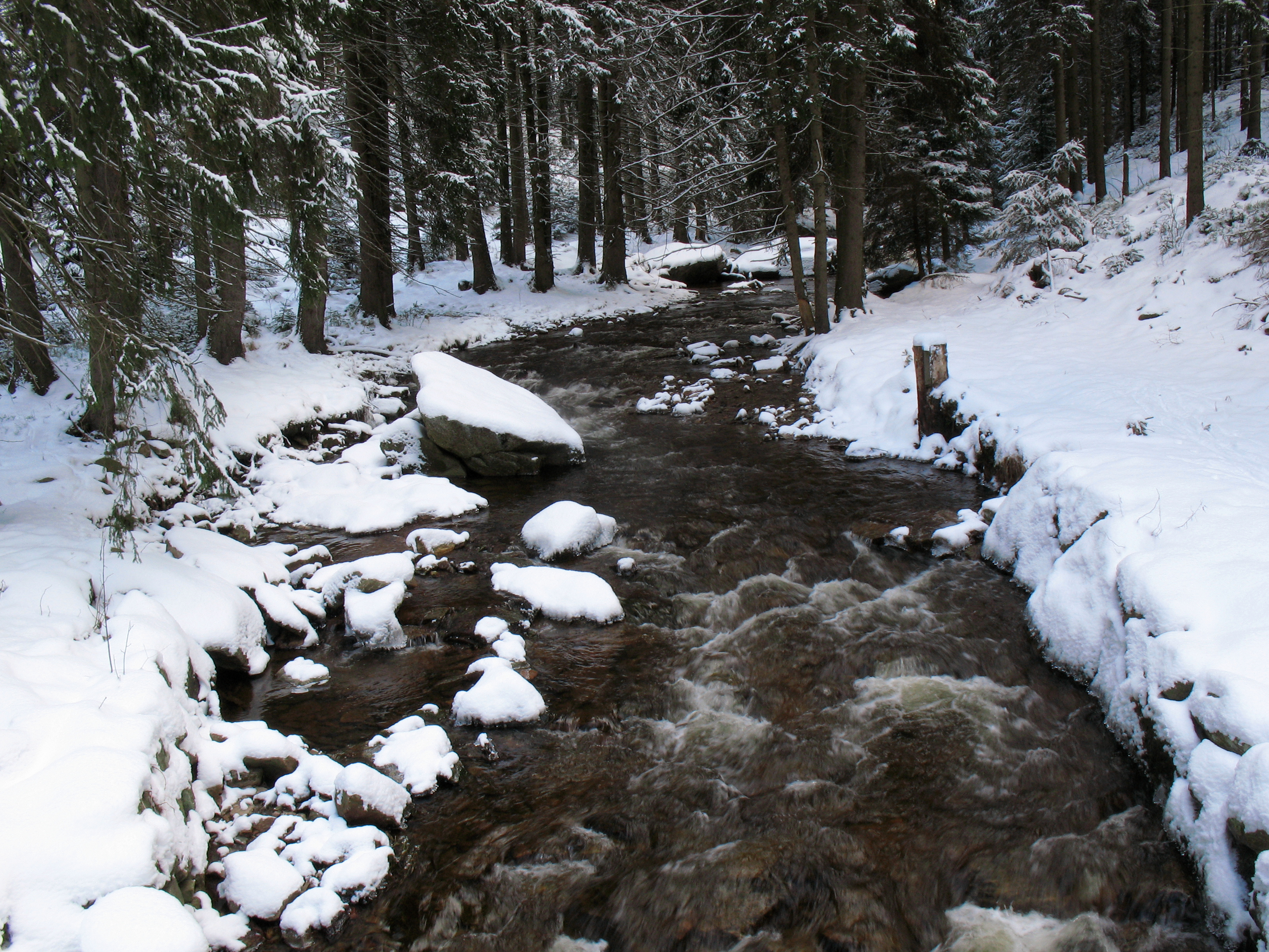 Schwarzwassertal zwischen Künhaide und Pobershau im Winter